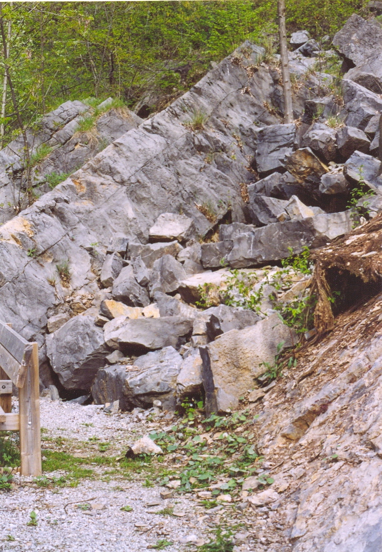 Cene, Parco paleontologico, Bergamo, Italia